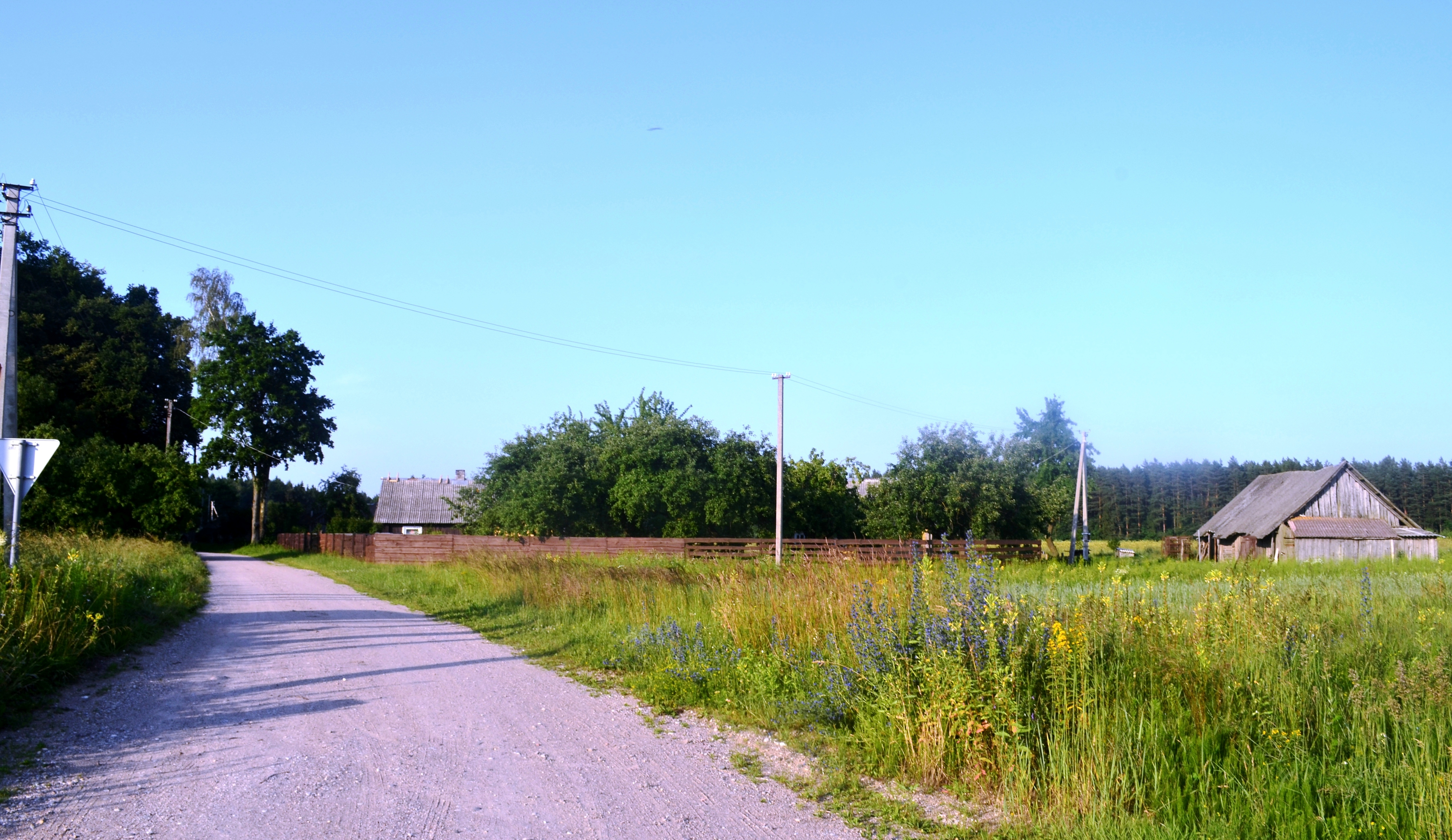 Markutiškiai, Jonavos raj.